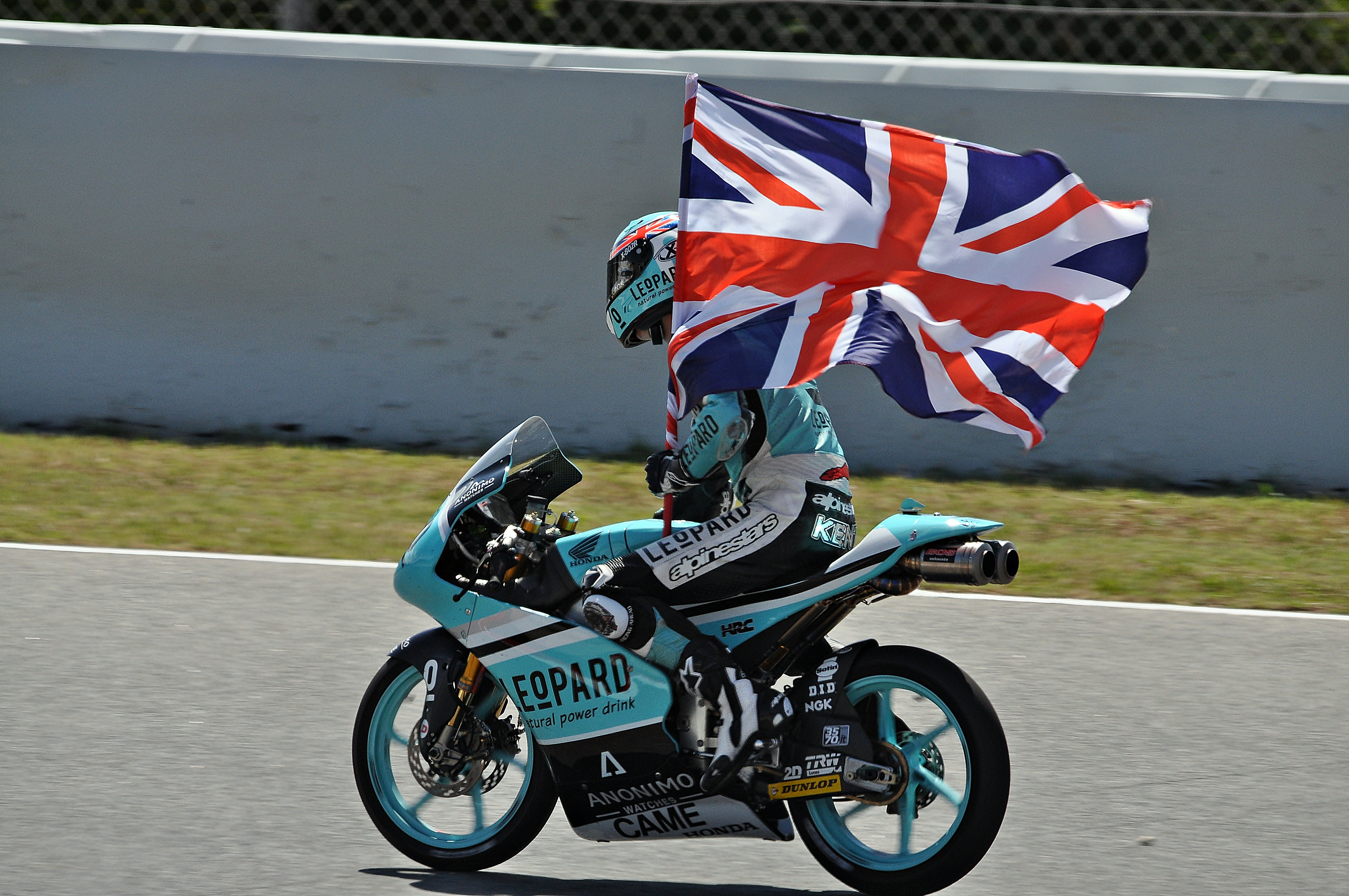 gran premio de cataluña